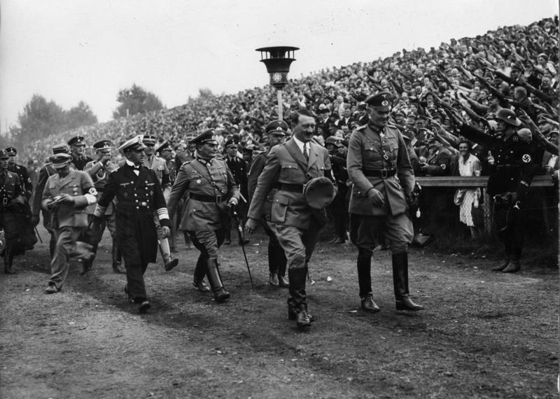 Nürnberg, Reichsparteitag der NSDAP Reichsparteitag der NSDAP 1934 in Nürnberg, v.r. [Werner] von Blomberg, [Adolf] Hitler dahinter [Werner] von Fritsch, [Hermann] Göring, [Erich] Raeder; Links der Fotograf Heinrich Hoffmann